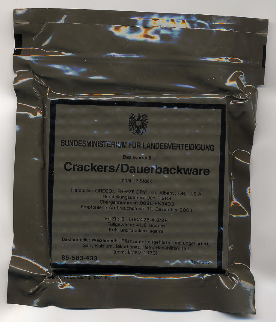 Crackers/Dauerbackware, Basisvorat II